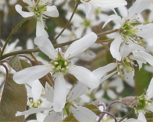 Amelanchier lamarckii